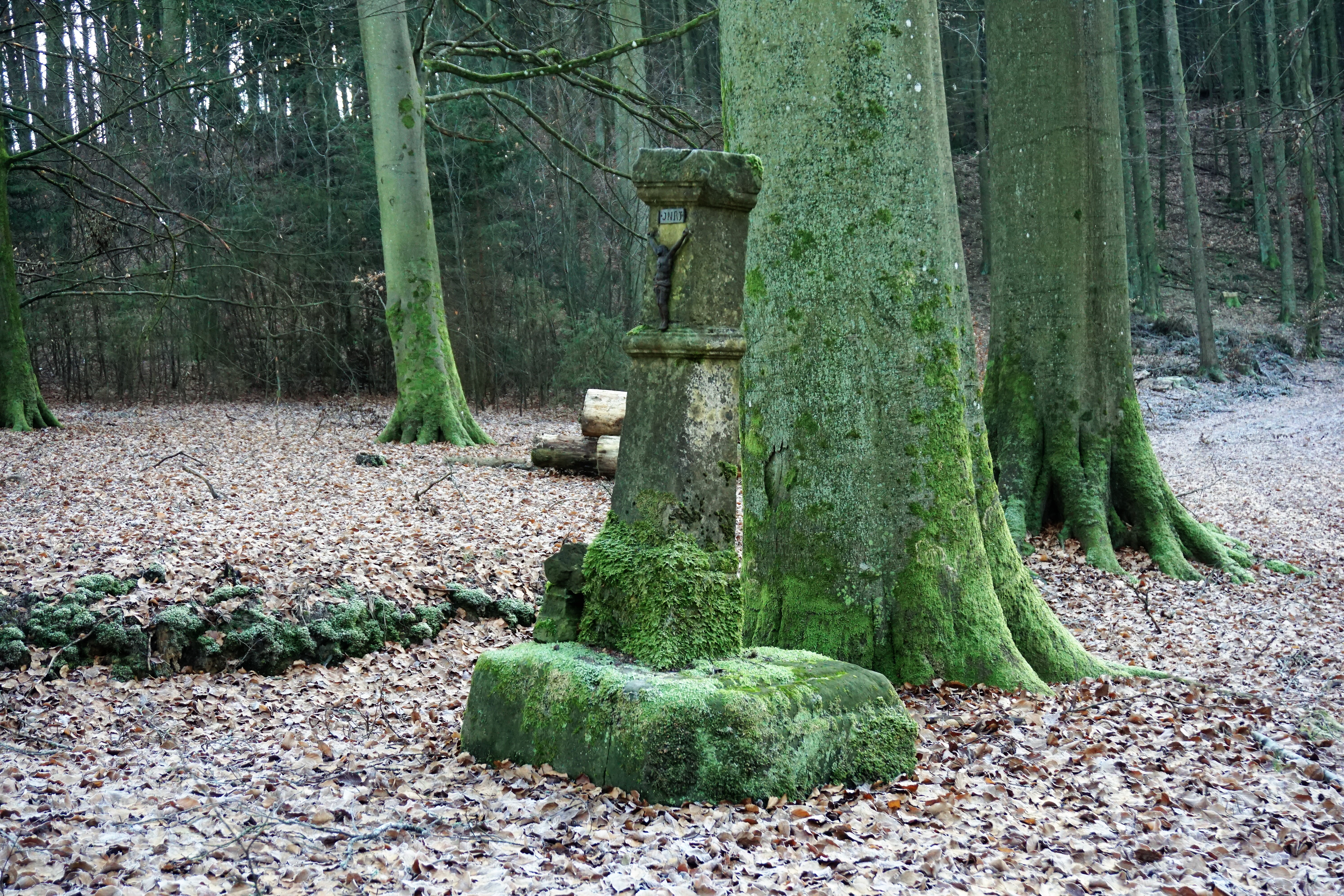 Grunewald, commune de Steinsel. Croix de chemin "Biergerkrtäiz".